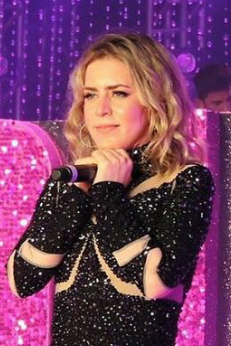 Lu em 2017.